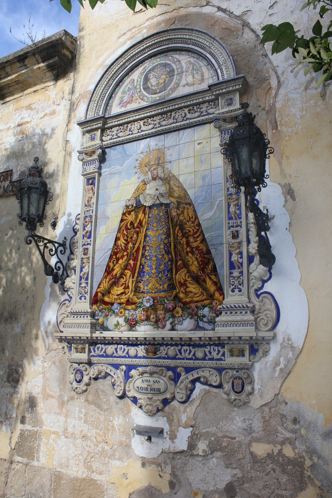 Iglesia de San Dionisio, Jerez de la Frontera (Andalucía, España)